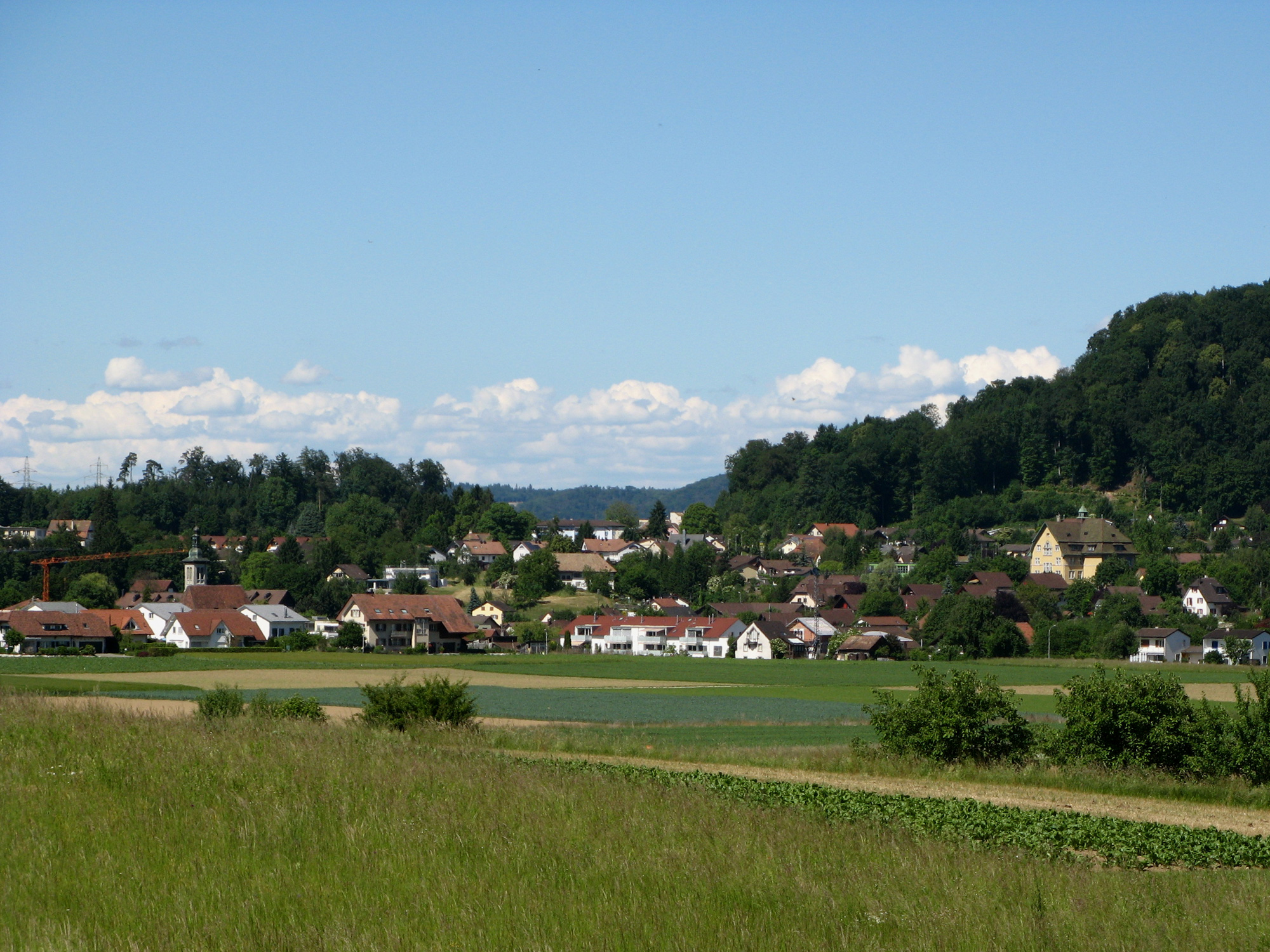 Ansicht von Othmarsingen